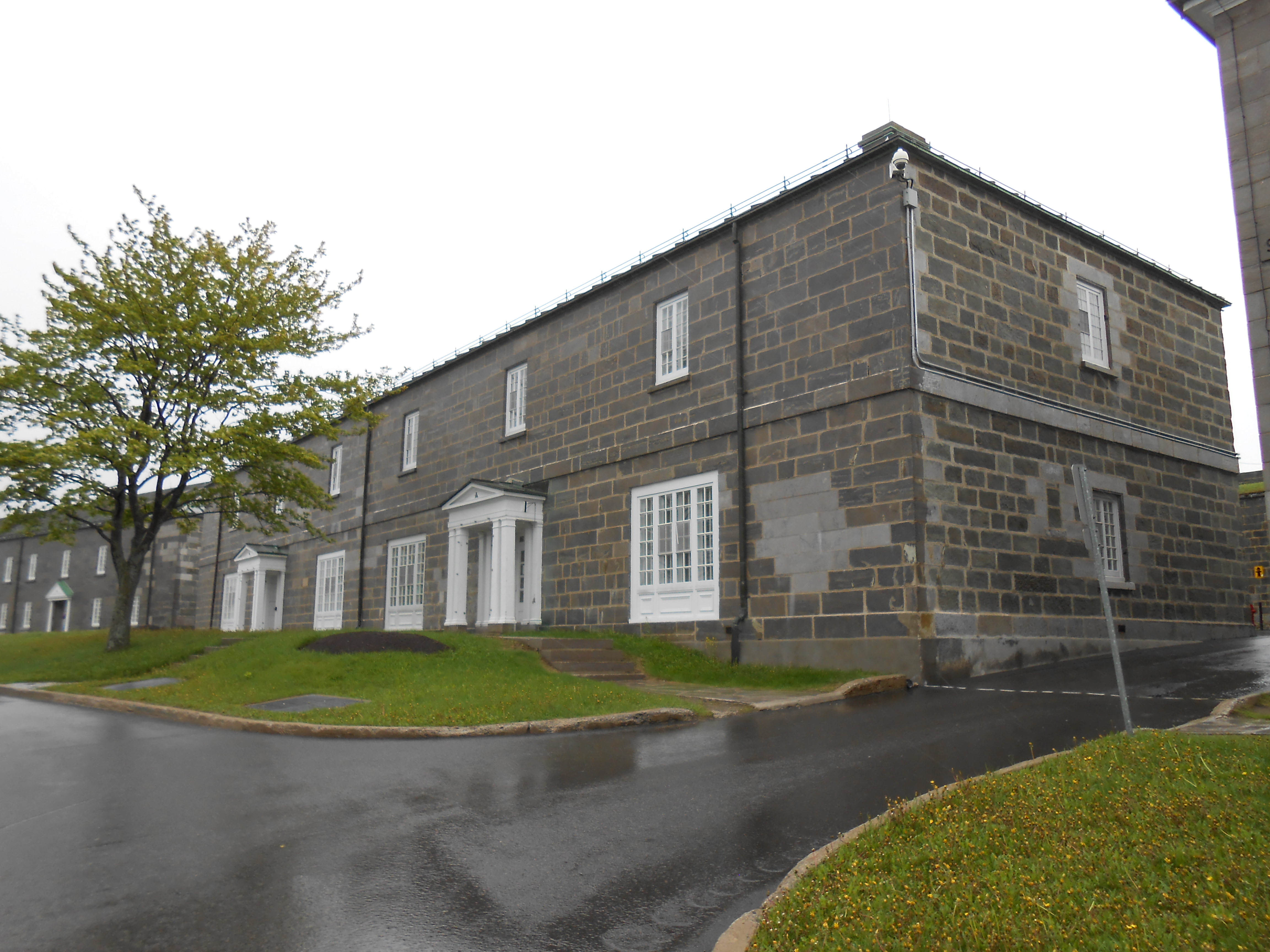 Citadelle de Québec